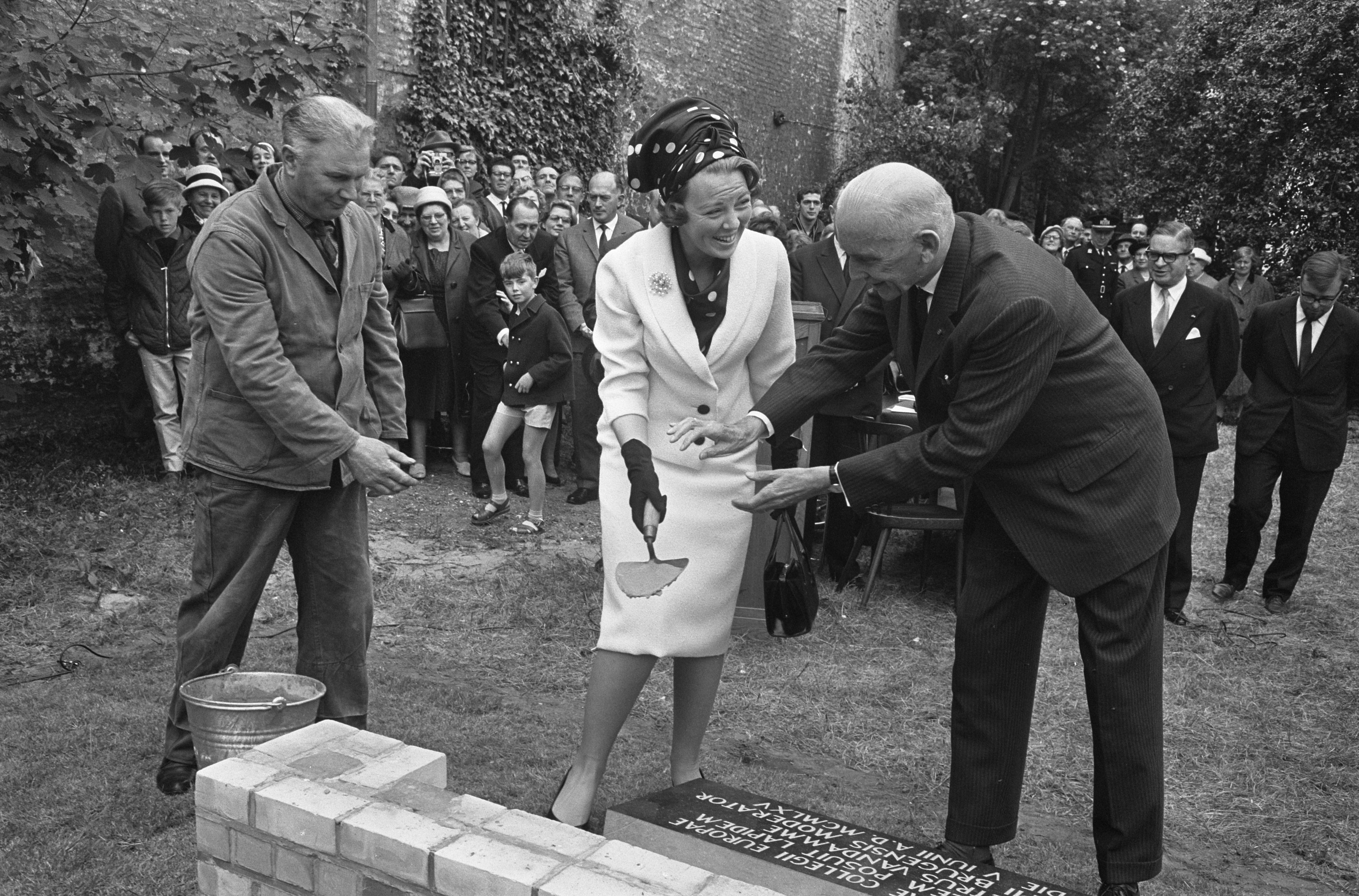 Collectie / Archief : Fotocollectie Anefo Reportage / Serie : [ onbekend ] Beschrijving : Prinses Beatrix in Brugge, eerste steen gelegd voor de bibliotheek Europacollege. De burgemeester van Brugge, Pierre Vandamme helpt de Prinses bij het metselwerk / Datum : 4 juni 1965 Locatie : Brugge Trefwoorden : bibliotheken, burgemeesters, prinsessen Persoonsnaam : Beatrix, prinses Fotograaf : Koch, Eric / Anefo Auteursrechthebbende : Nationaal Archief Materiaalsoort : Negatief (zwart/wit) Nummer archiefinventaris : bekijk toegang 2.24.01.05 Bestanddeelnummer : 917-8422